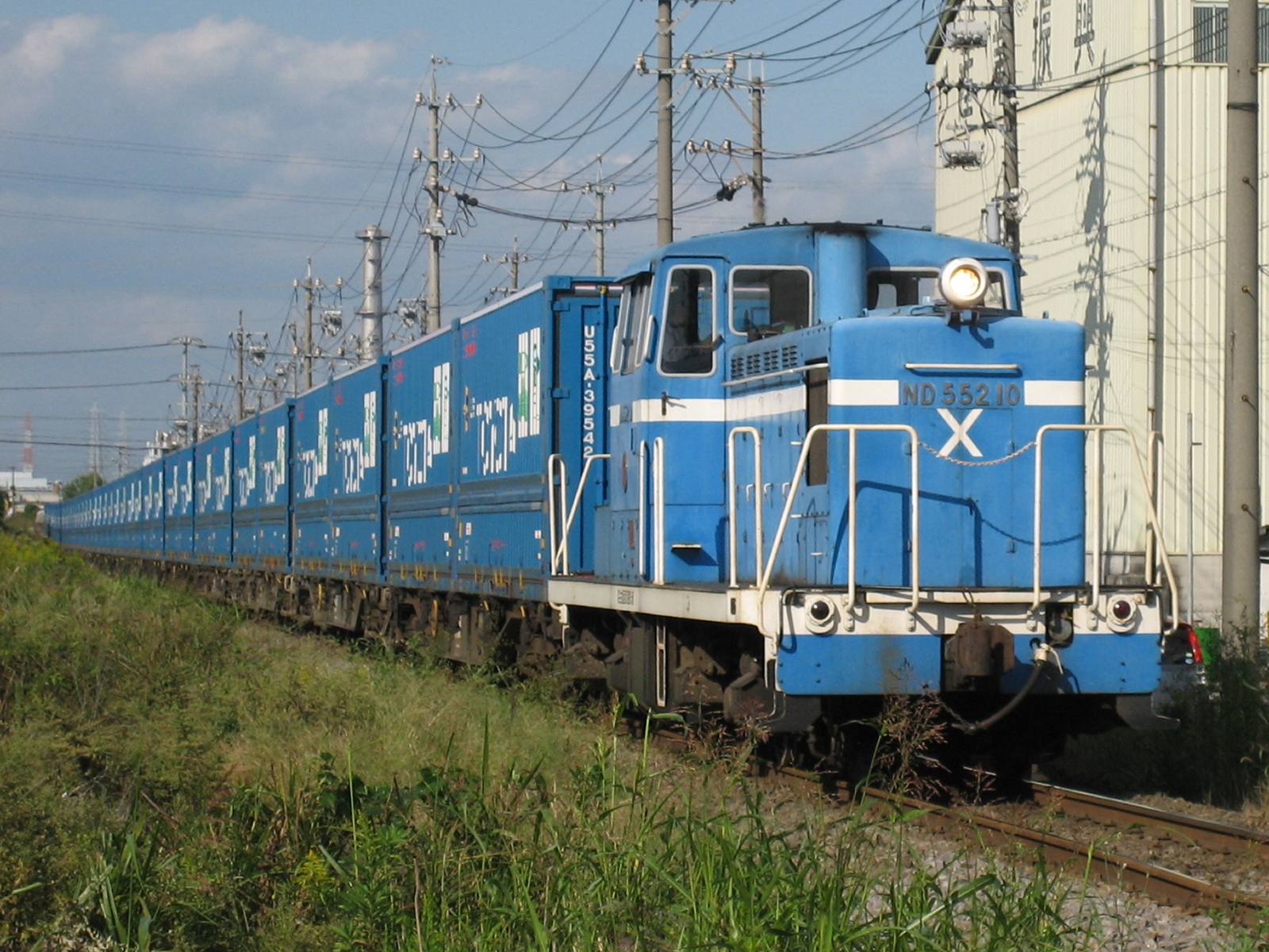 名古屋臨海鉄道南港線を走行する「TOYOTA LONGPASS EXPRESS」